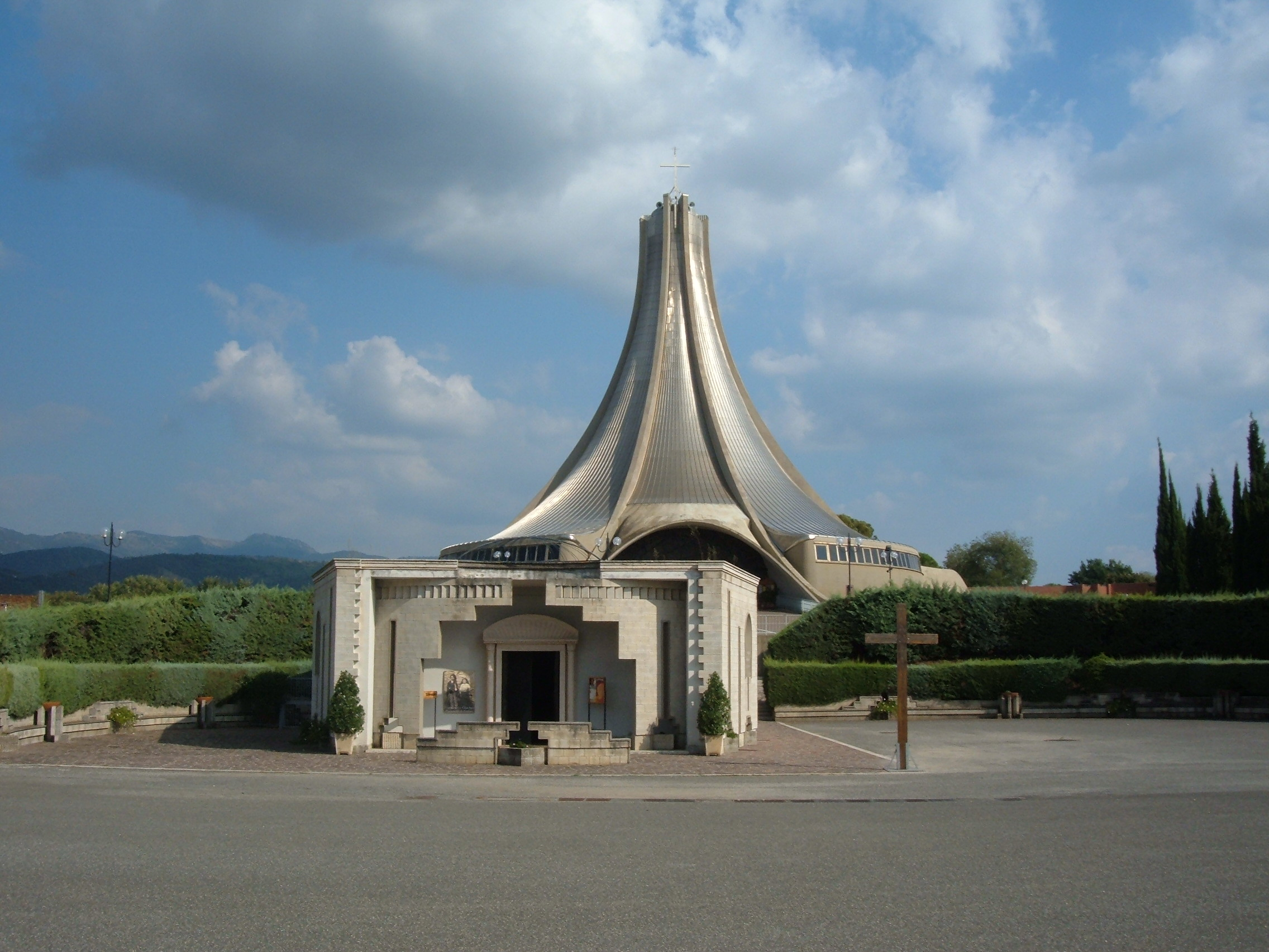 Santuario di Nostra Signora di Fatima, a San Vittorino Romano (Roma). Cripta e santuario.